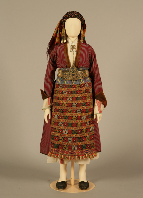 Νυφική ή γιορτινή φορεσιά Σουφλί, Θράκη. Αρχές 20ού αιώνα Συλλογή Πελοποννησιακού Λαογραφικού Ιδρύματος, Ναύπλιο